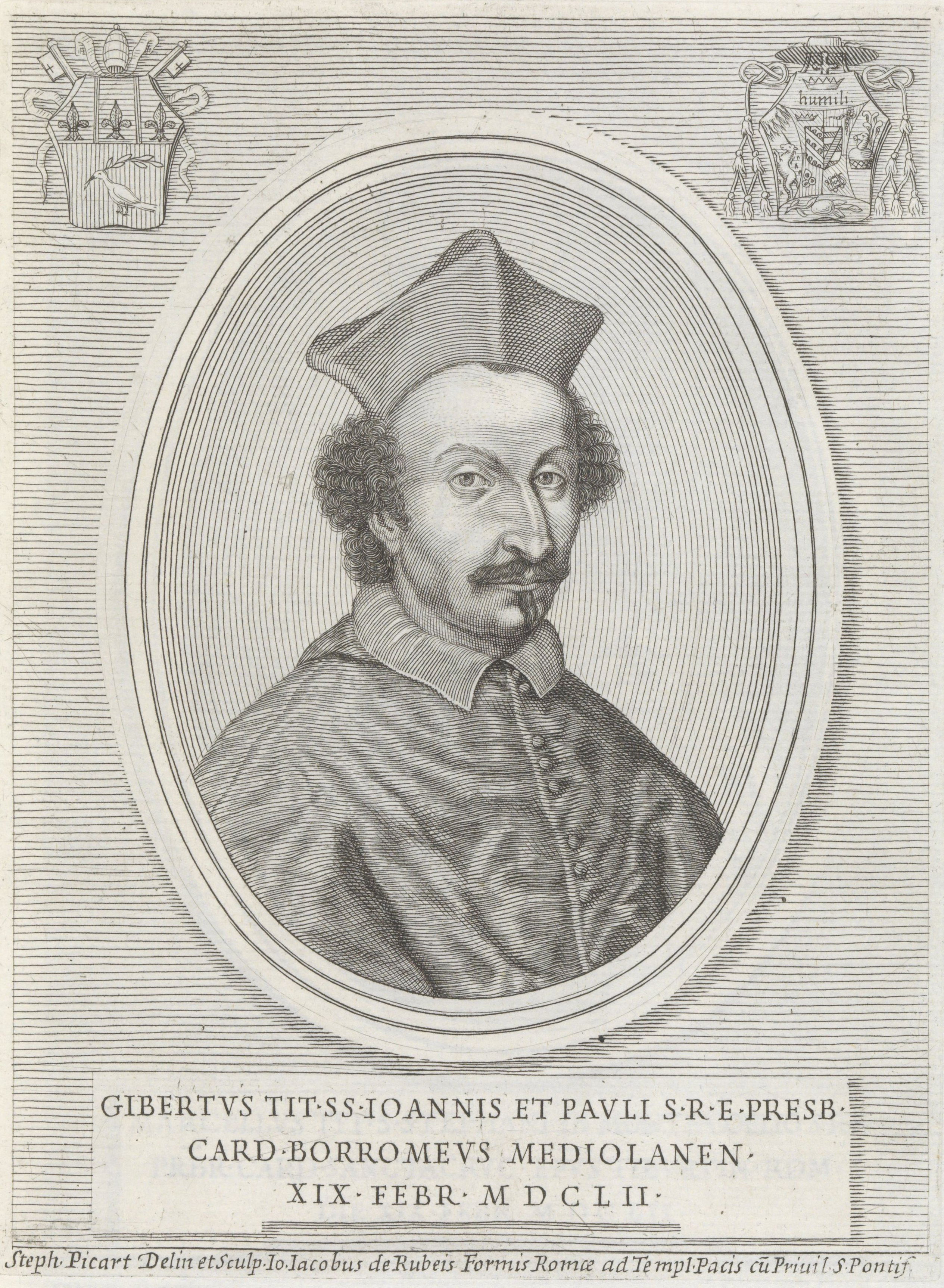 Linksboven het wapen van paus Innocentius X en rechtsboven het wapen van Borromeo. Onderaan een onderschrift in het Latijn.